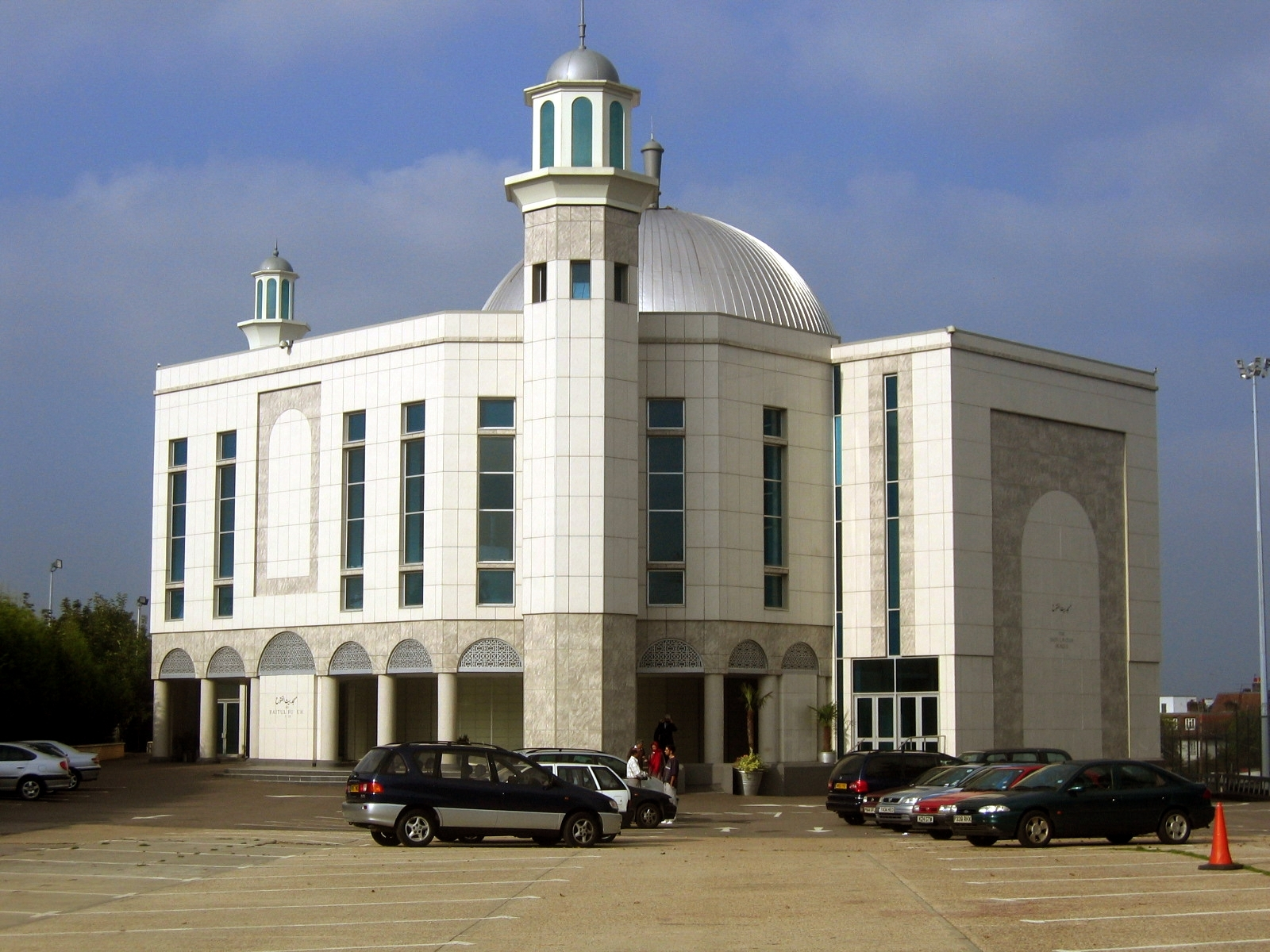 The Baitul Futuh Mosque in London